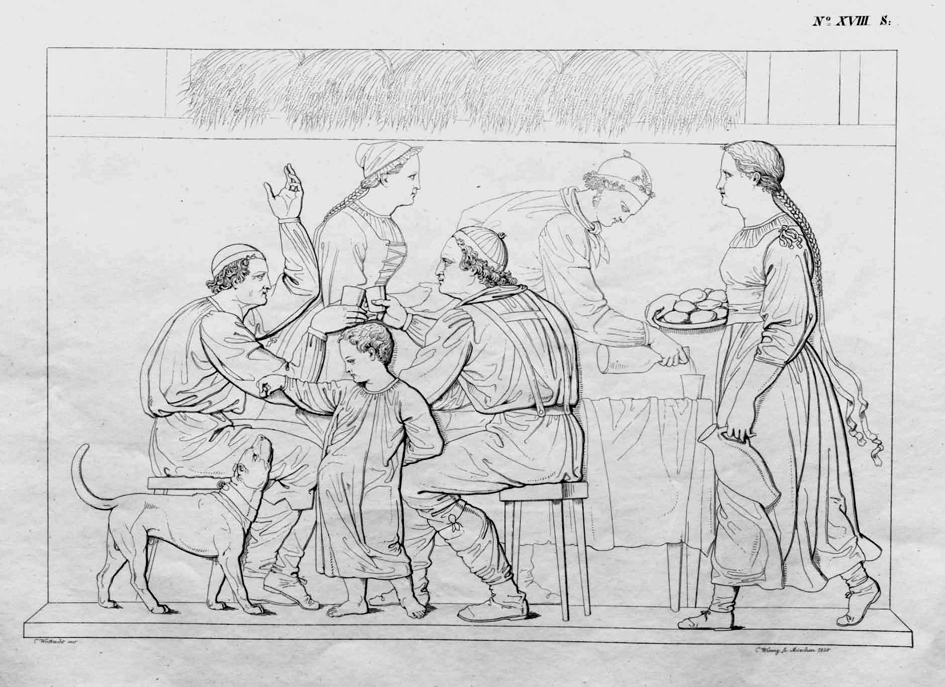 Blatt aus der Buchausgabe in Breitfolio von Conrad Weitbrechts graphischem Zyklus „Die vier Jahreszeiten“, das im Vierjahreszeitenfries von Schloss Rosenstein in Stuttgart realisiert wurde (teilweise mit Varianten).